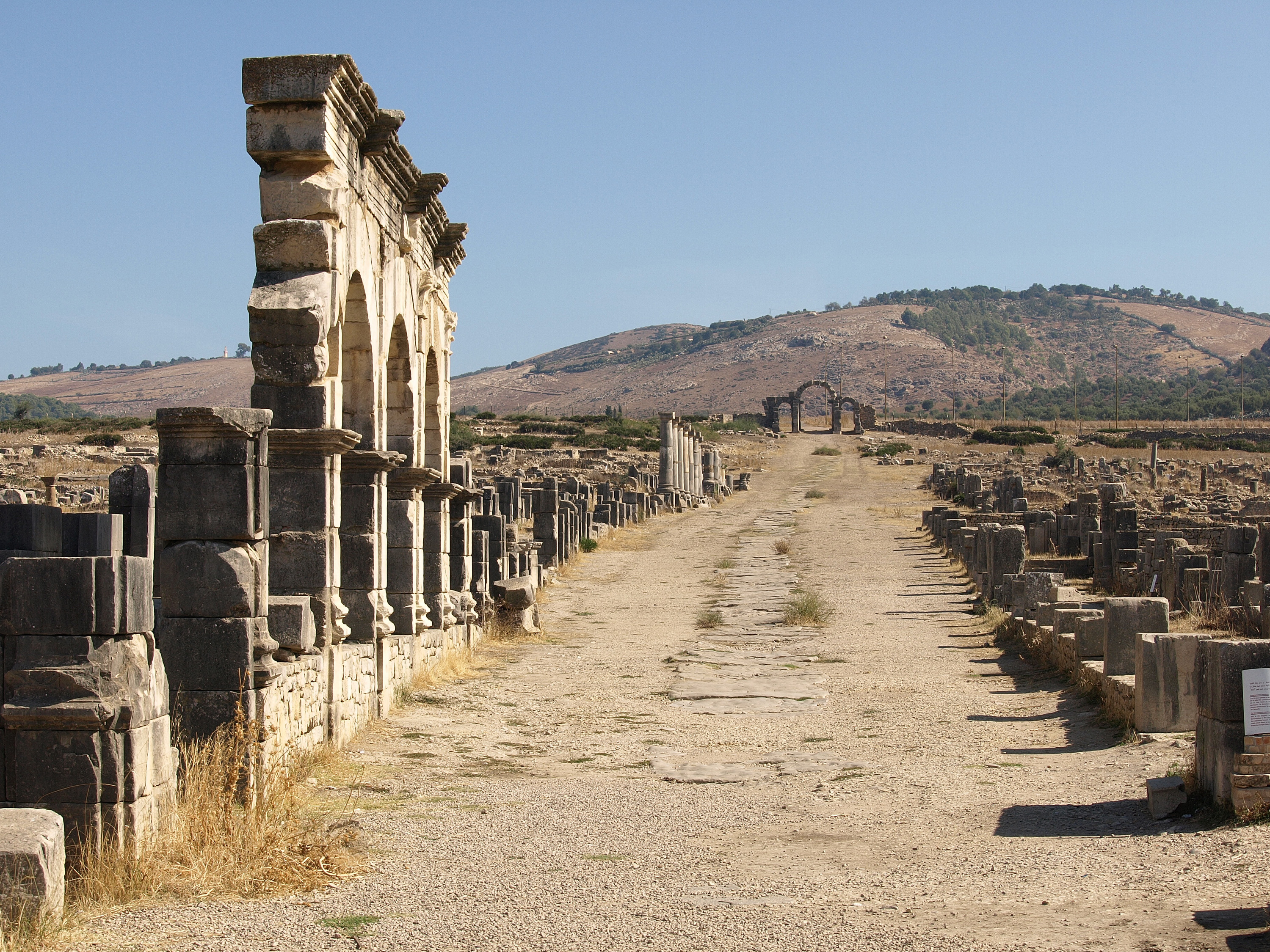 Hauptstraße in Volubilis